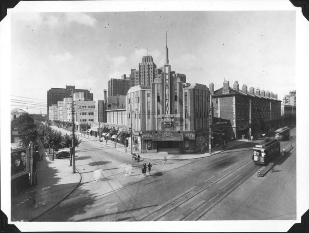 中文（中国大陆）: 霞飞路与迈尔西爱路路口，今淮海路与茂名南路路口，图中为国泰大戏院